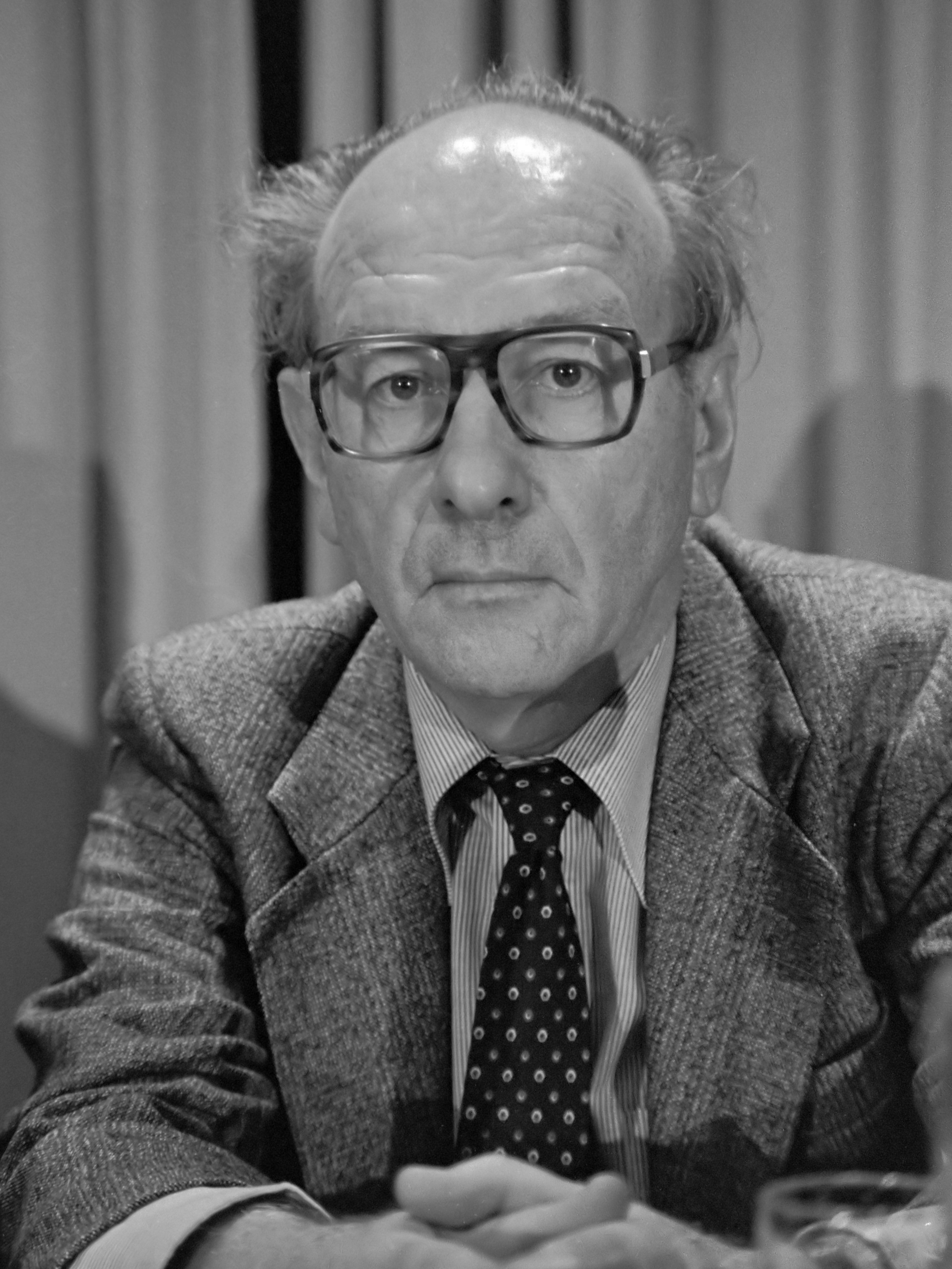 Buitengewone vergadering Volker Stevin te Rotterdam, drie leden van het tijdelijke college van bestuur, drs. A. Smit , mr. ir. Kokje , 17 december 1980